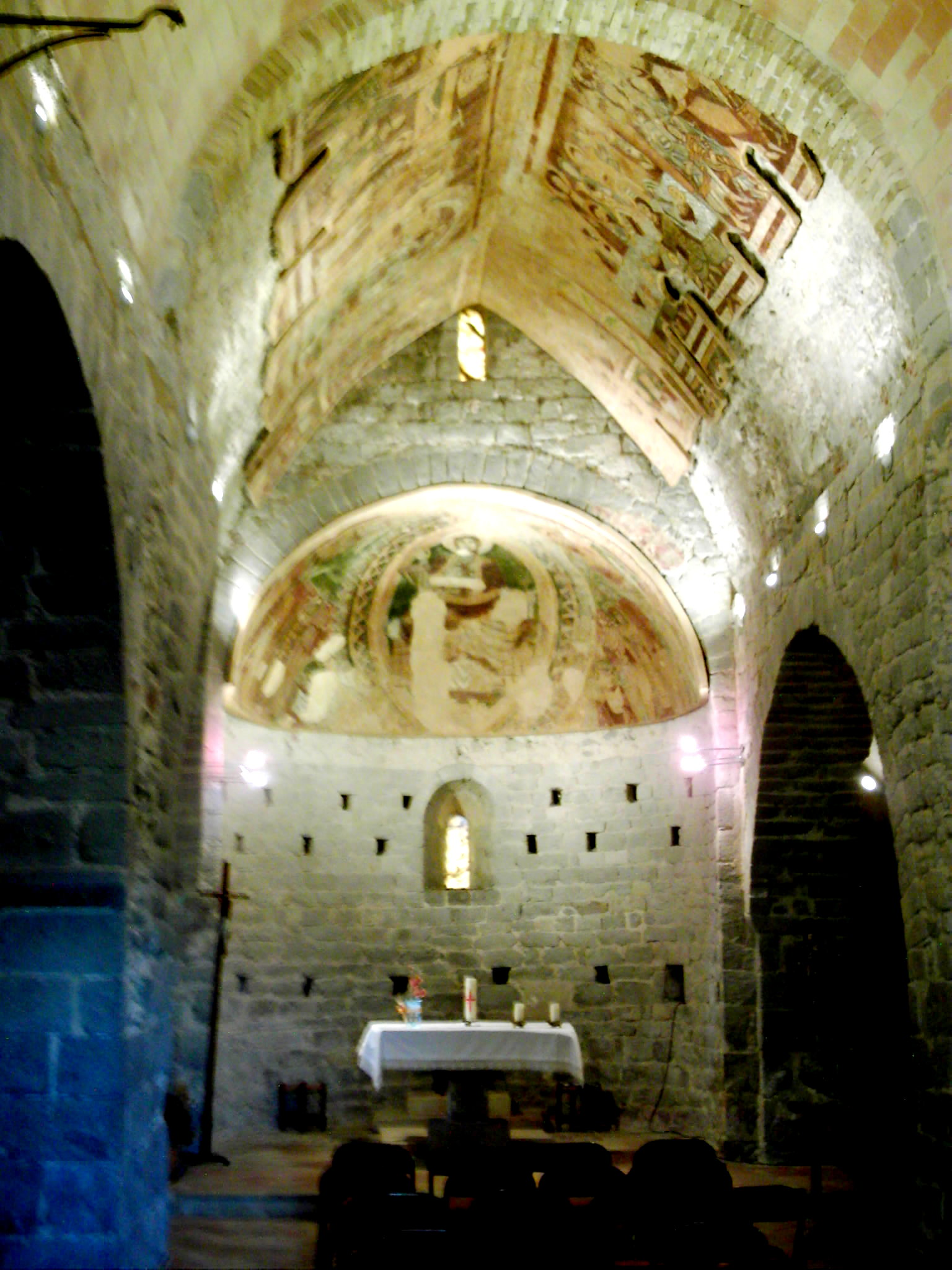 église de st Tomàs de Fluvià